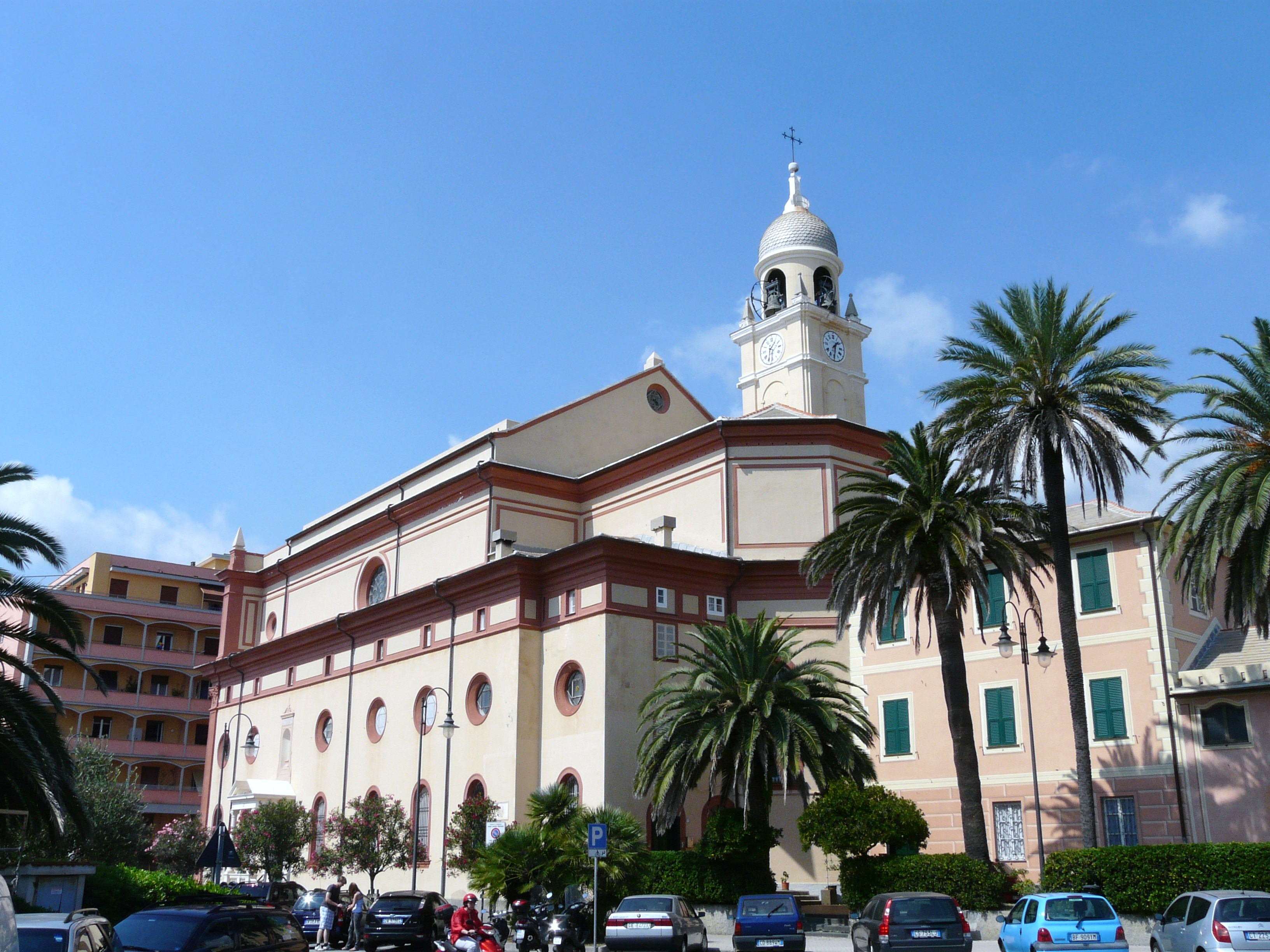 Chiesa di Santa Maria Maggiore, Cogoleto, Liguria, Italia